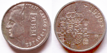 moneda de 1 peseta de 1999. España